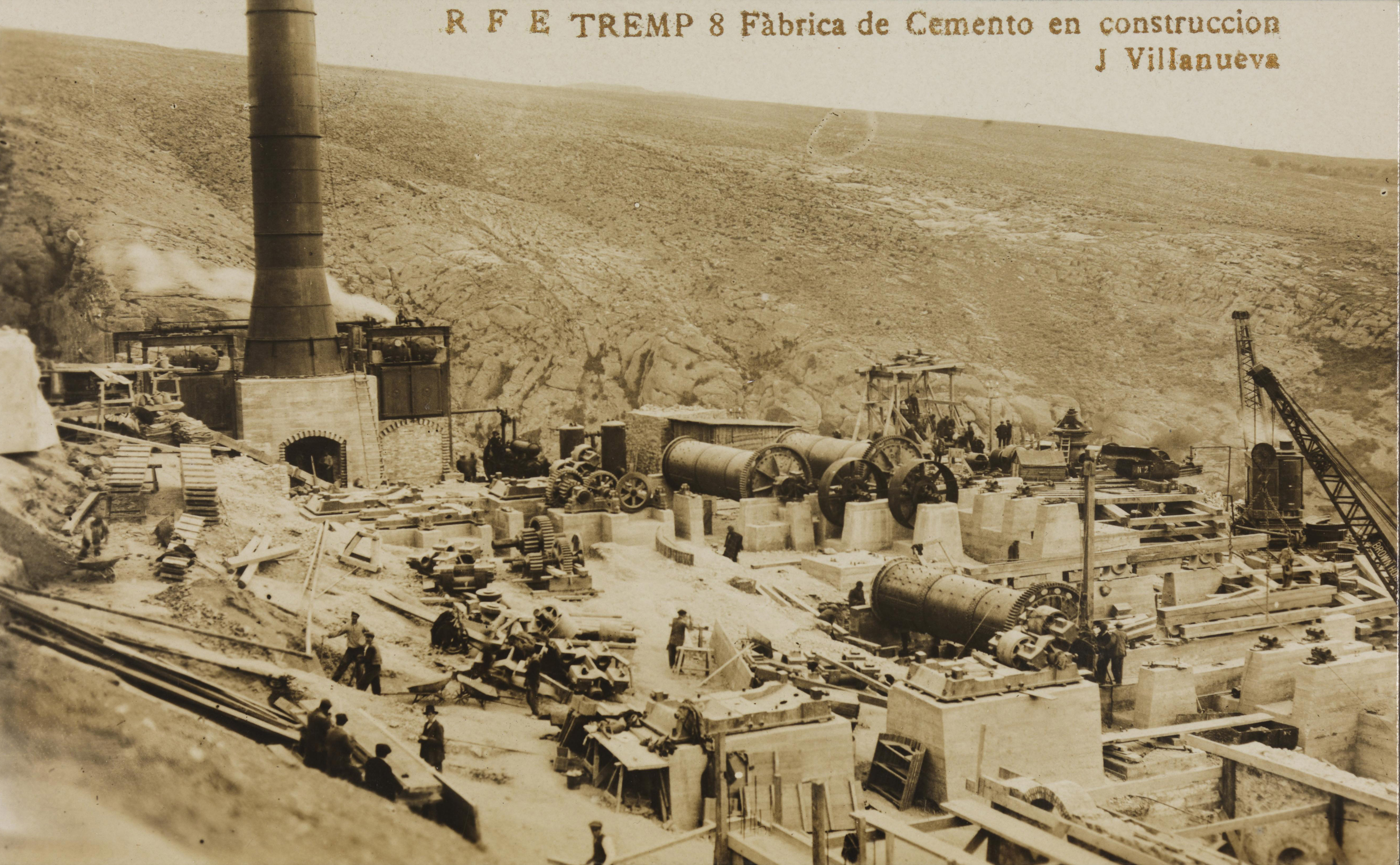 Construcció de la fàbrica de cement per a les obres de la central hidroelèctrica de Talarn (Pallars Sobirà)